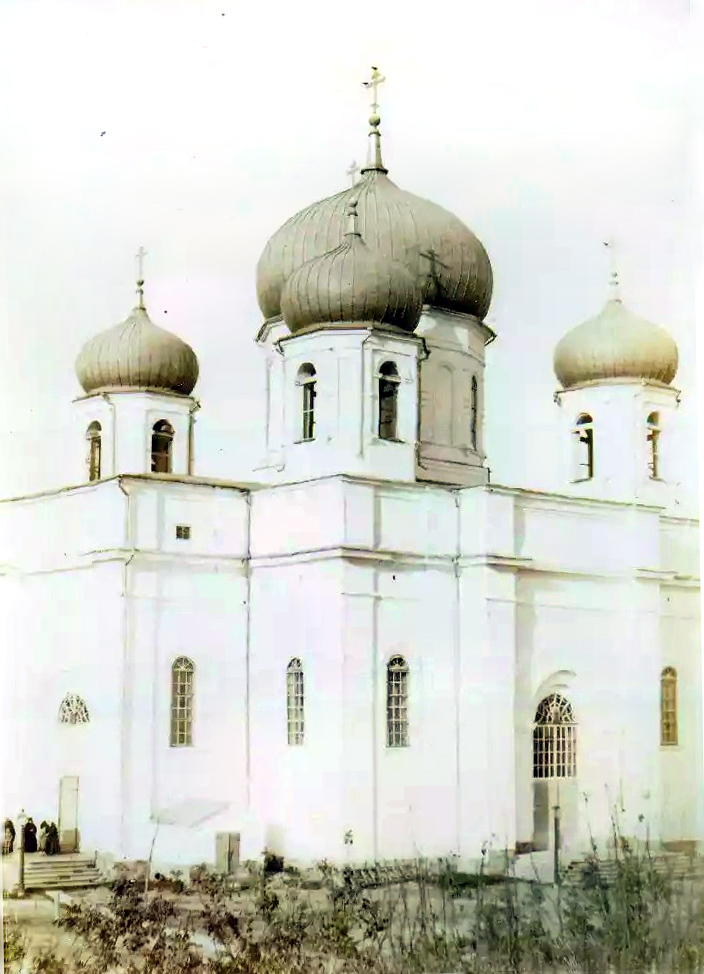 Тихвинский собор Тихвинского Богородицкого монастыря в Бузулуке